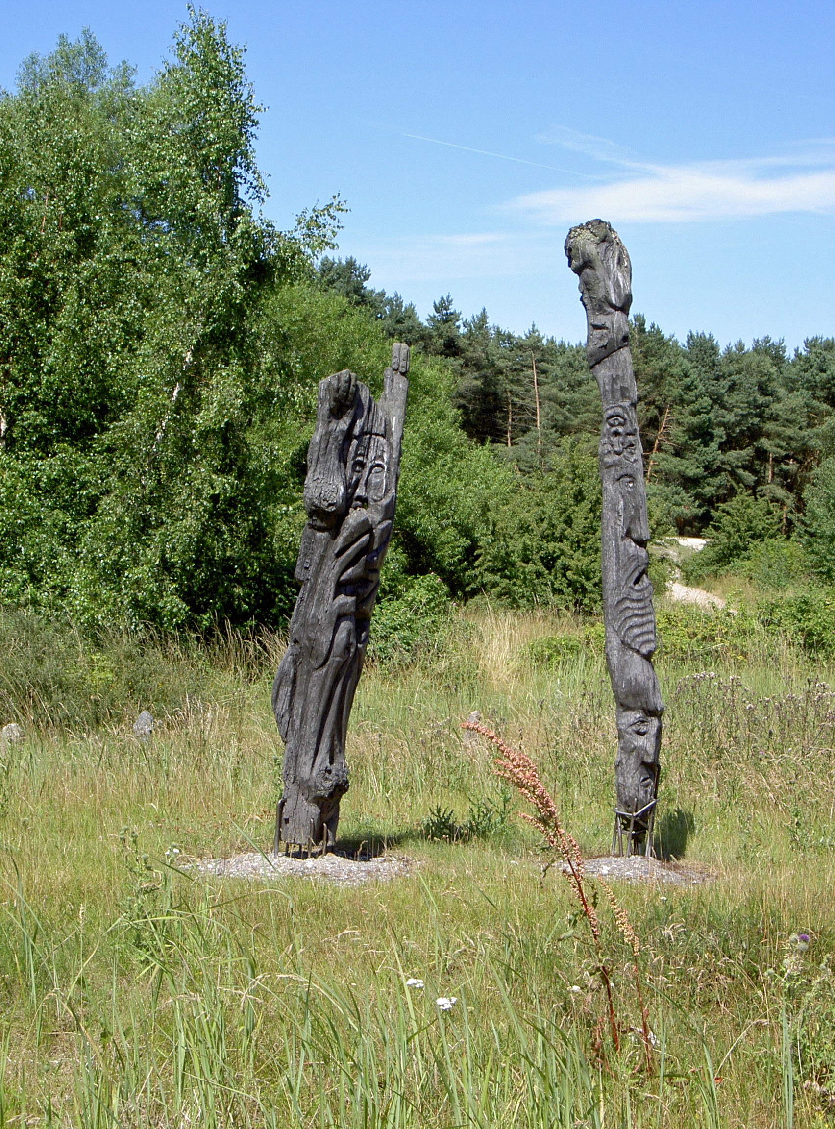 Die ,,Grömitzer - Buhnen" wurden im Zuge der Erneuerung der Kurpromenade von Karl Simon in Grömitz erschaffen und der Gemeinde als Dauerleihgabe zur Verfügung gestellt. Alle verarbeiteten Materialien stammen aus dem Ostseeheilbad Grömitz; die Buhnen wurden bis zu ihrer künstlerischen Umgestaltung als Buhnenpfähle im Grömitzer Küstenschutz genutzt. Die Buhnen wurden im Deichvorgelände (beim Hundestrand) aufgestellt.